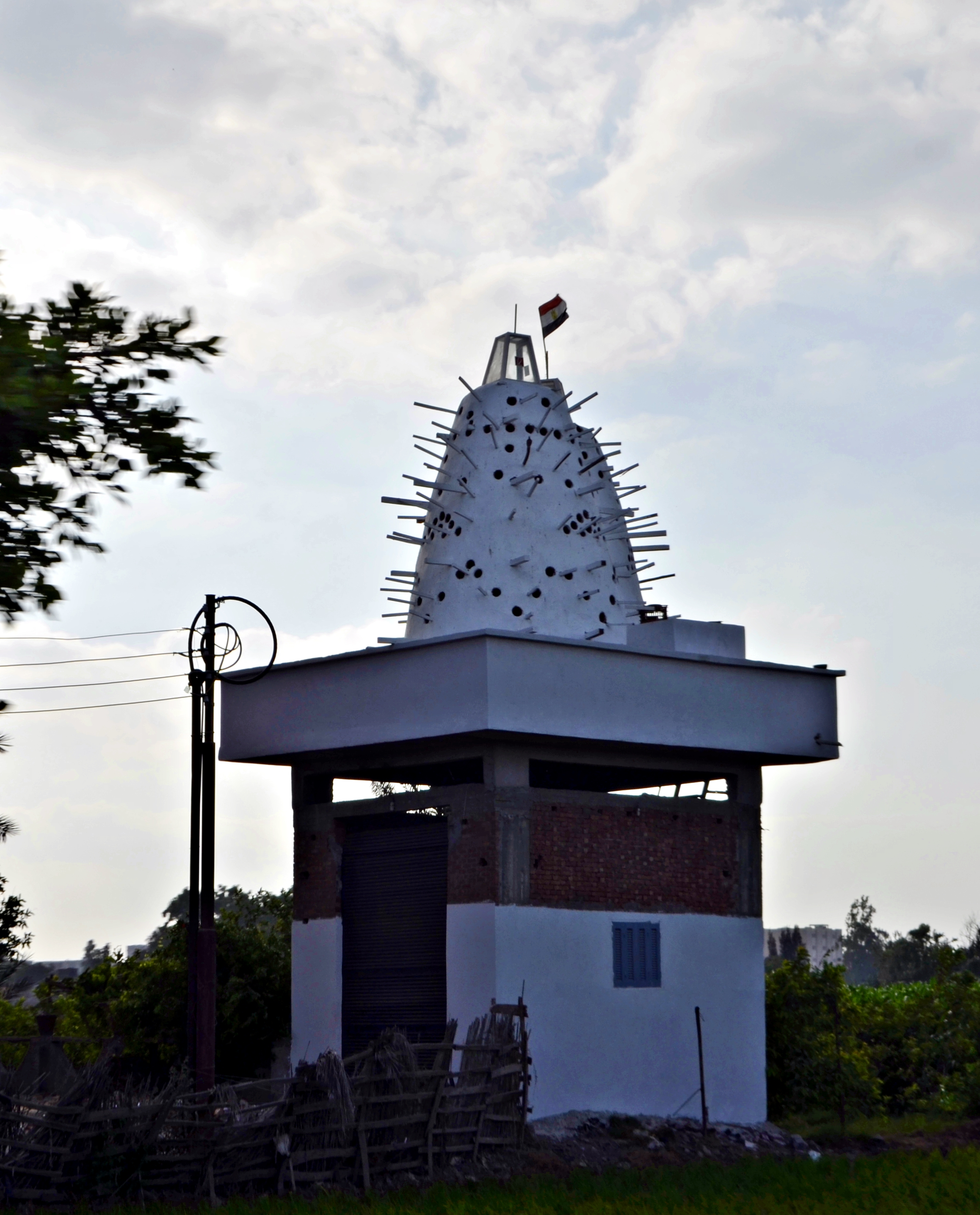 برج حمام في مدينة دسوق، مصر